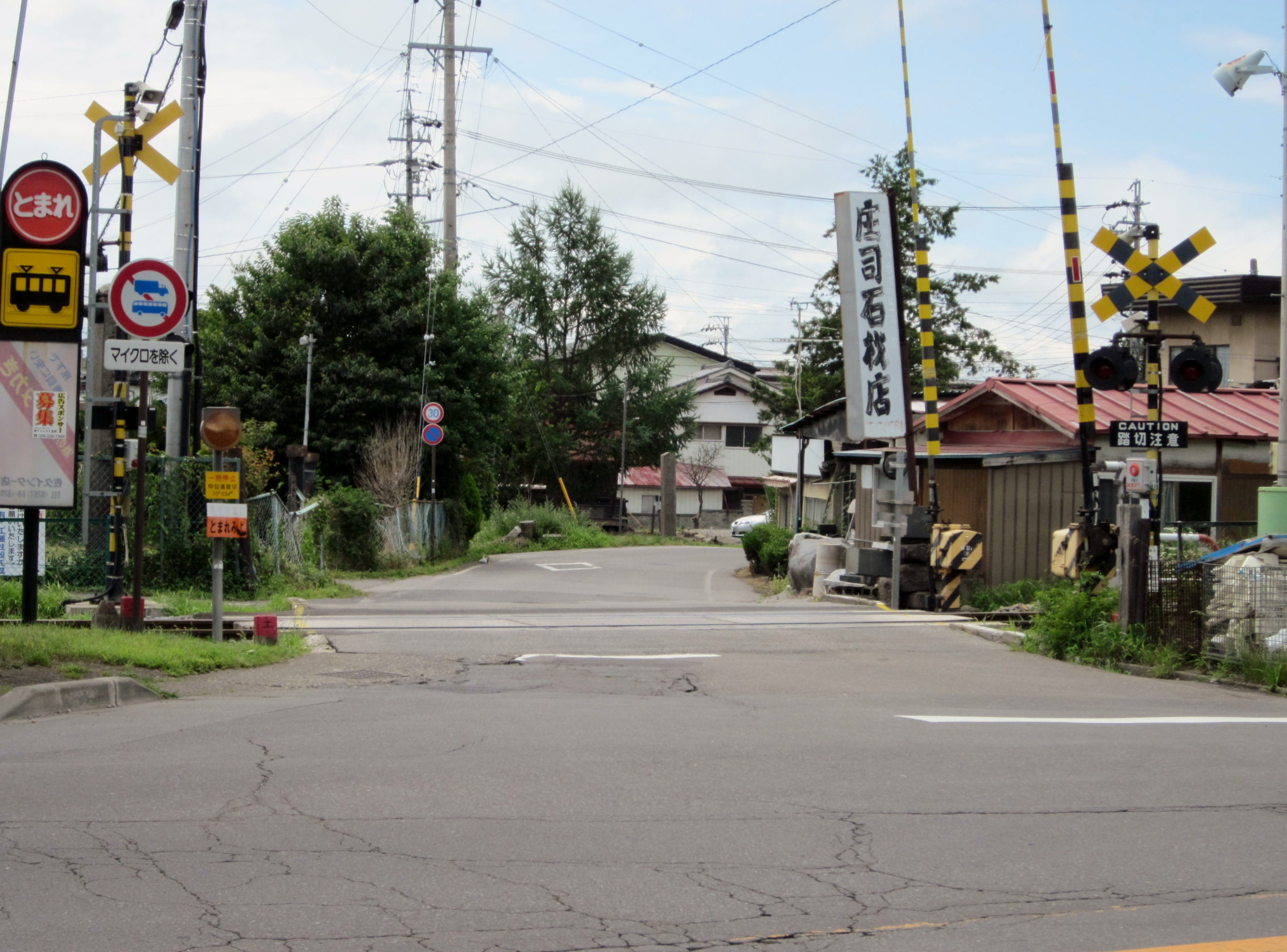 長野県道154号塩名田佐久線終点（佐久市岩村田）